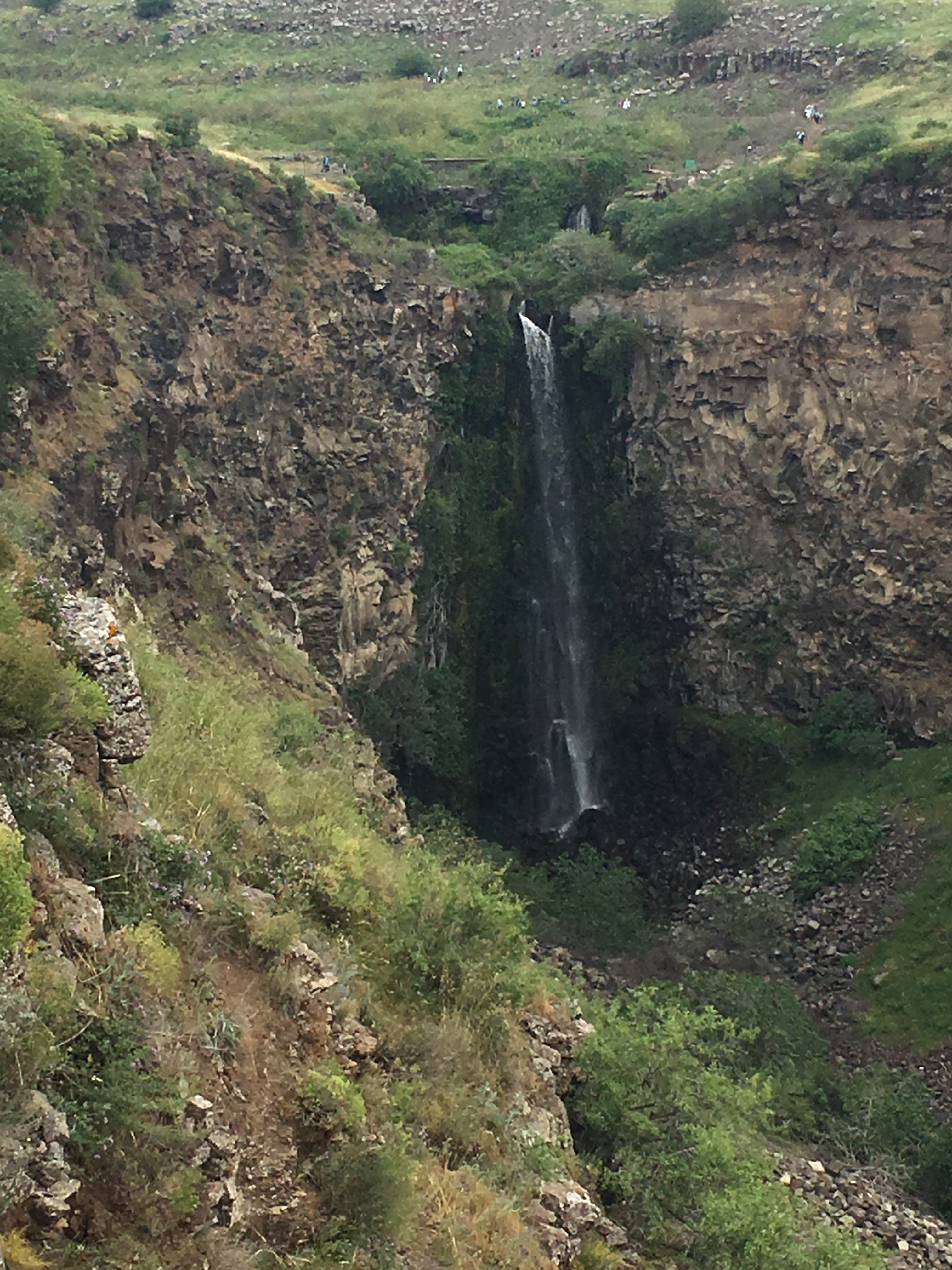 מפל גמלא - המפל הגבוה בישראל, בשמורת גמלא